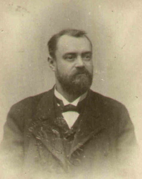 Josef Hodek